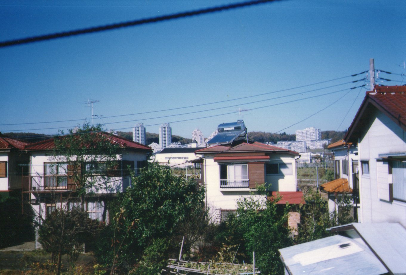 90年12月 長峰、尾根幹線出来る前の向陽台の様子